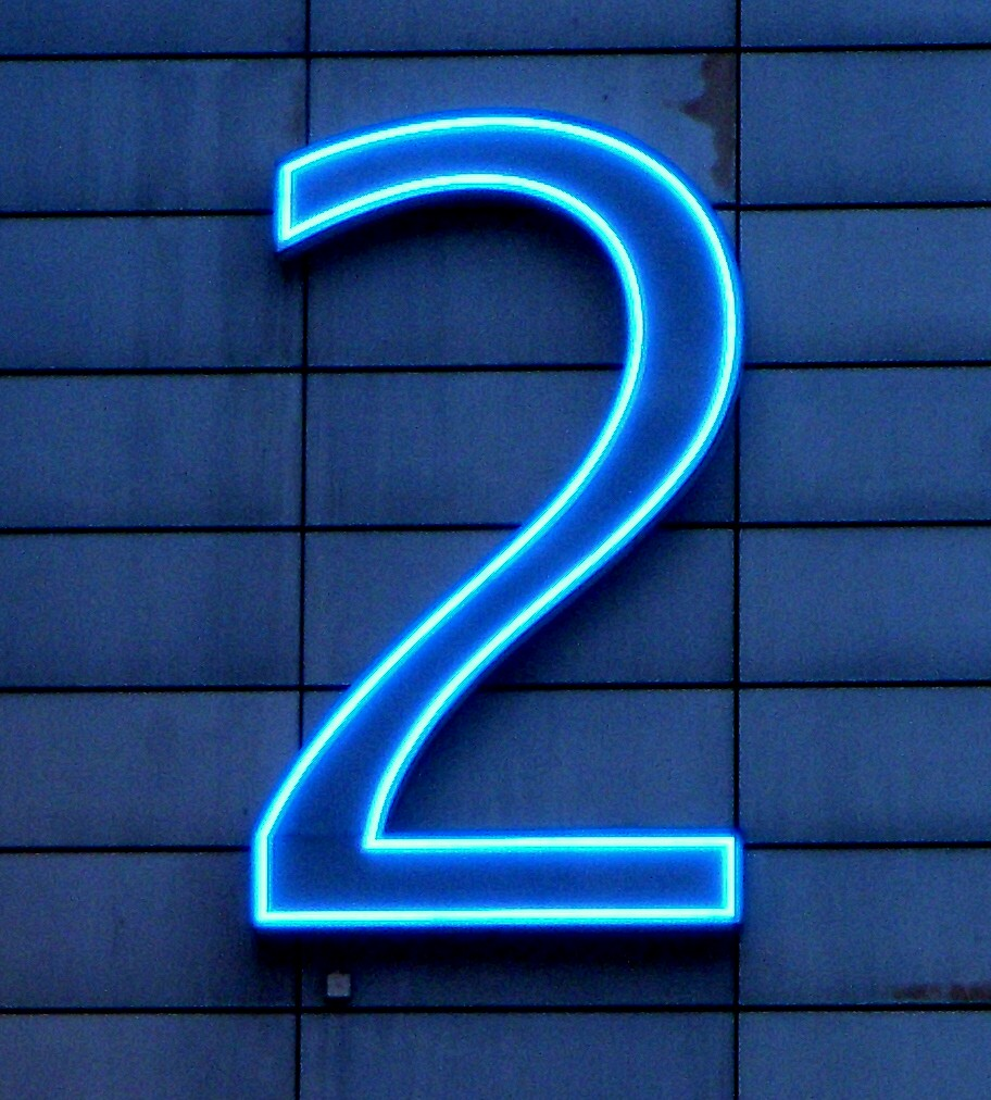 Neonskylt på Hötorgsskrapan nr 2, Stockholm